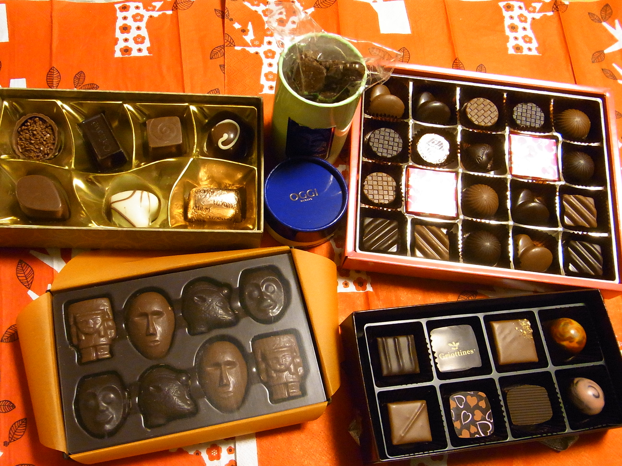 バレンタイン